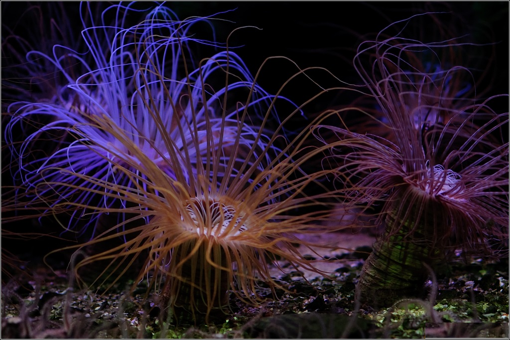 Cerianthidae sp en el Océarium du Croisic, Francia.